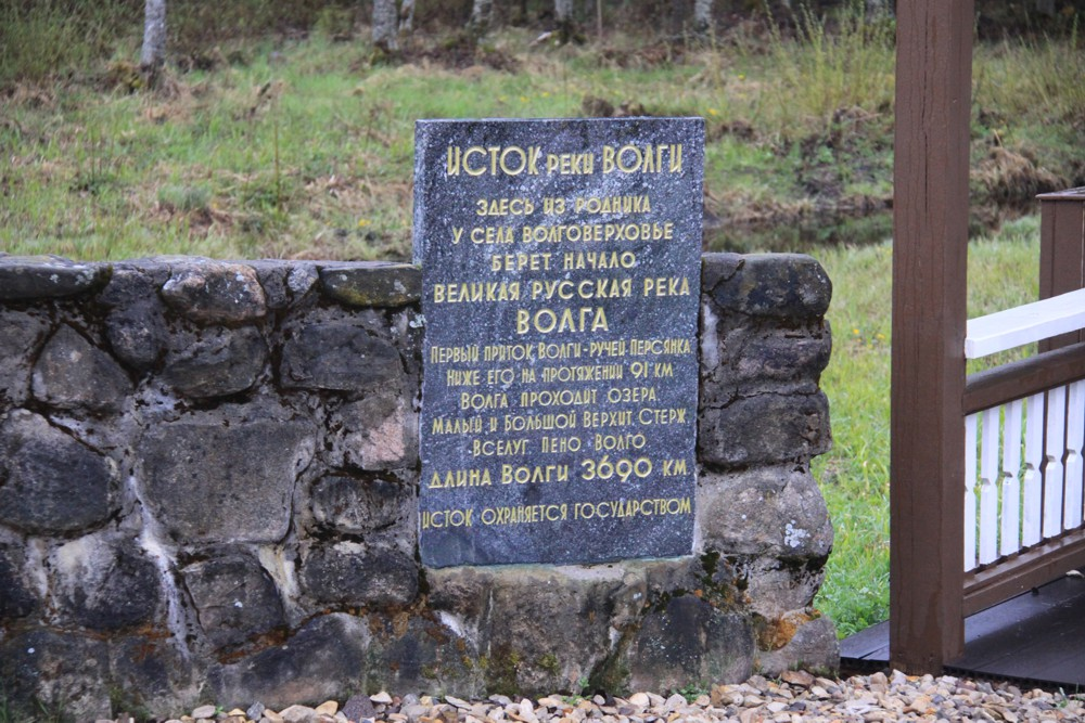 Памятная табличка на Истоке Волги